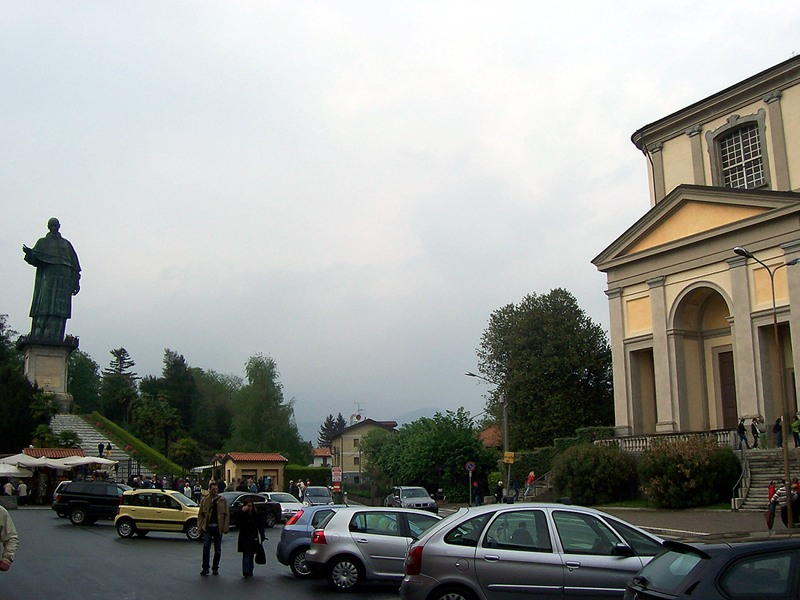 Arona - Statua del S. Carlone e Chiesa di S. Carlo